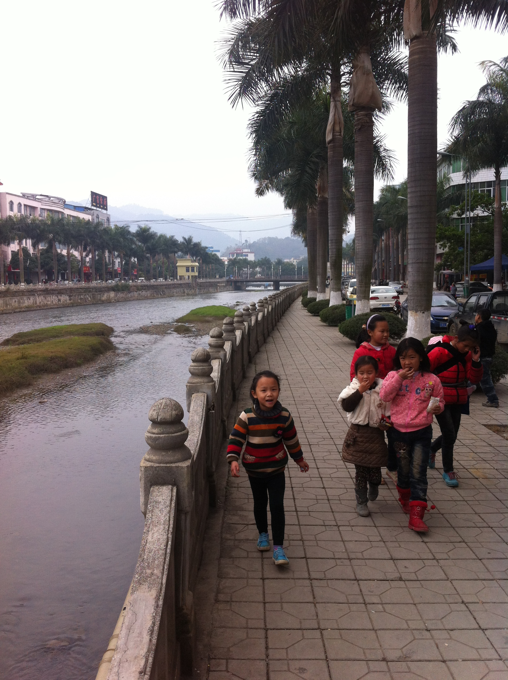 快樂的童年（雲南富寧）